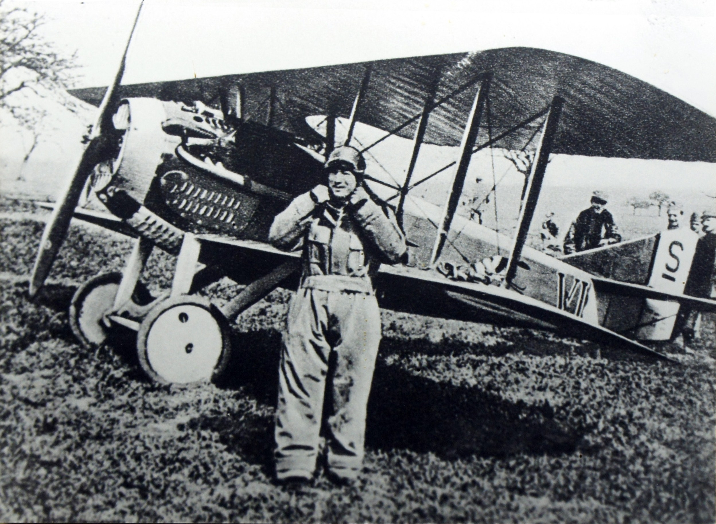 René_Fonck_est son avion un Spad_XIII_, le pilote appartient à l'escadrille : Spa_103_en_1918.